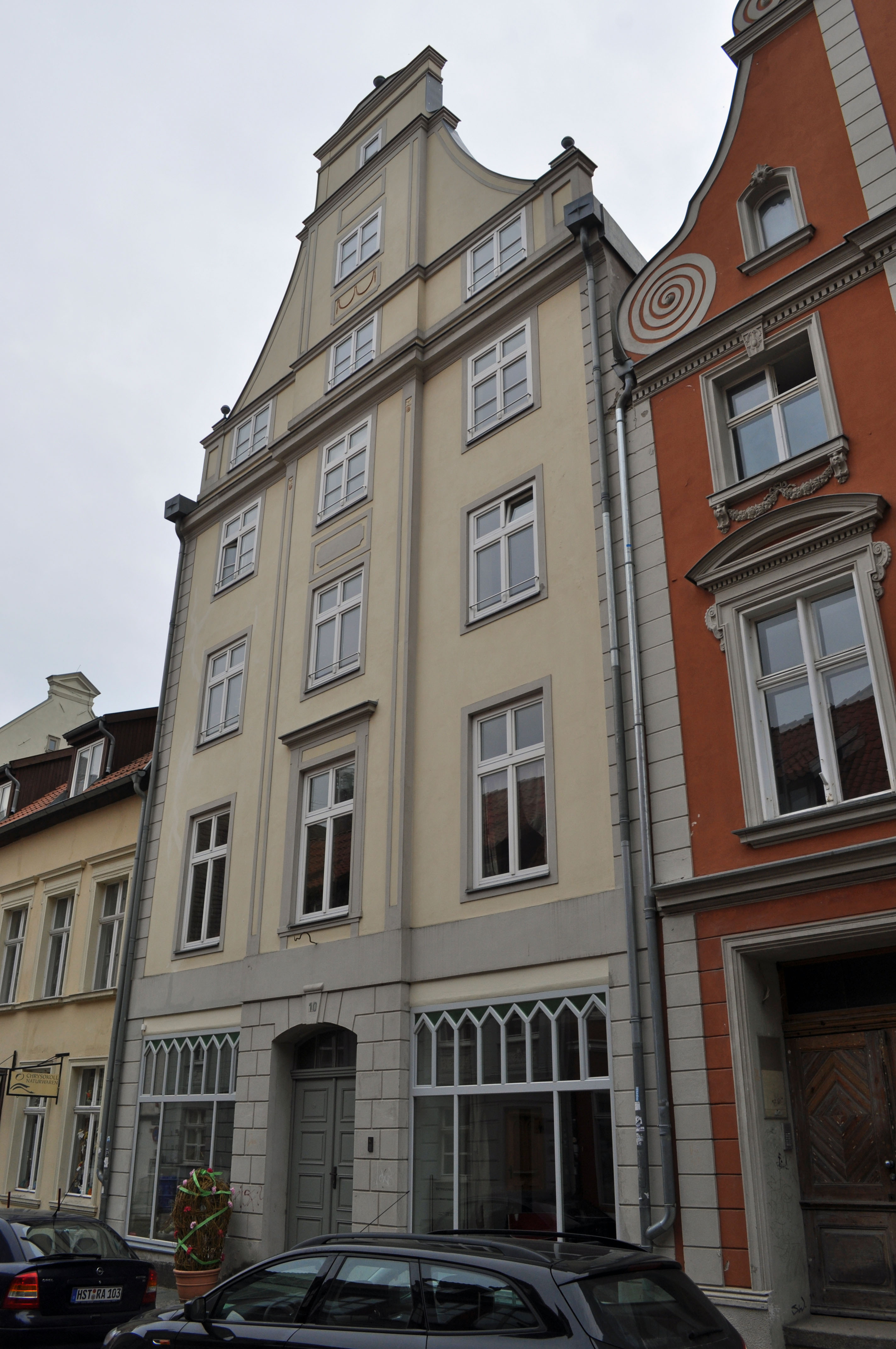 Gebäude bzw. Gebäudedetail in Stralsund. Straße und Hausnummer siehe Dateiname.